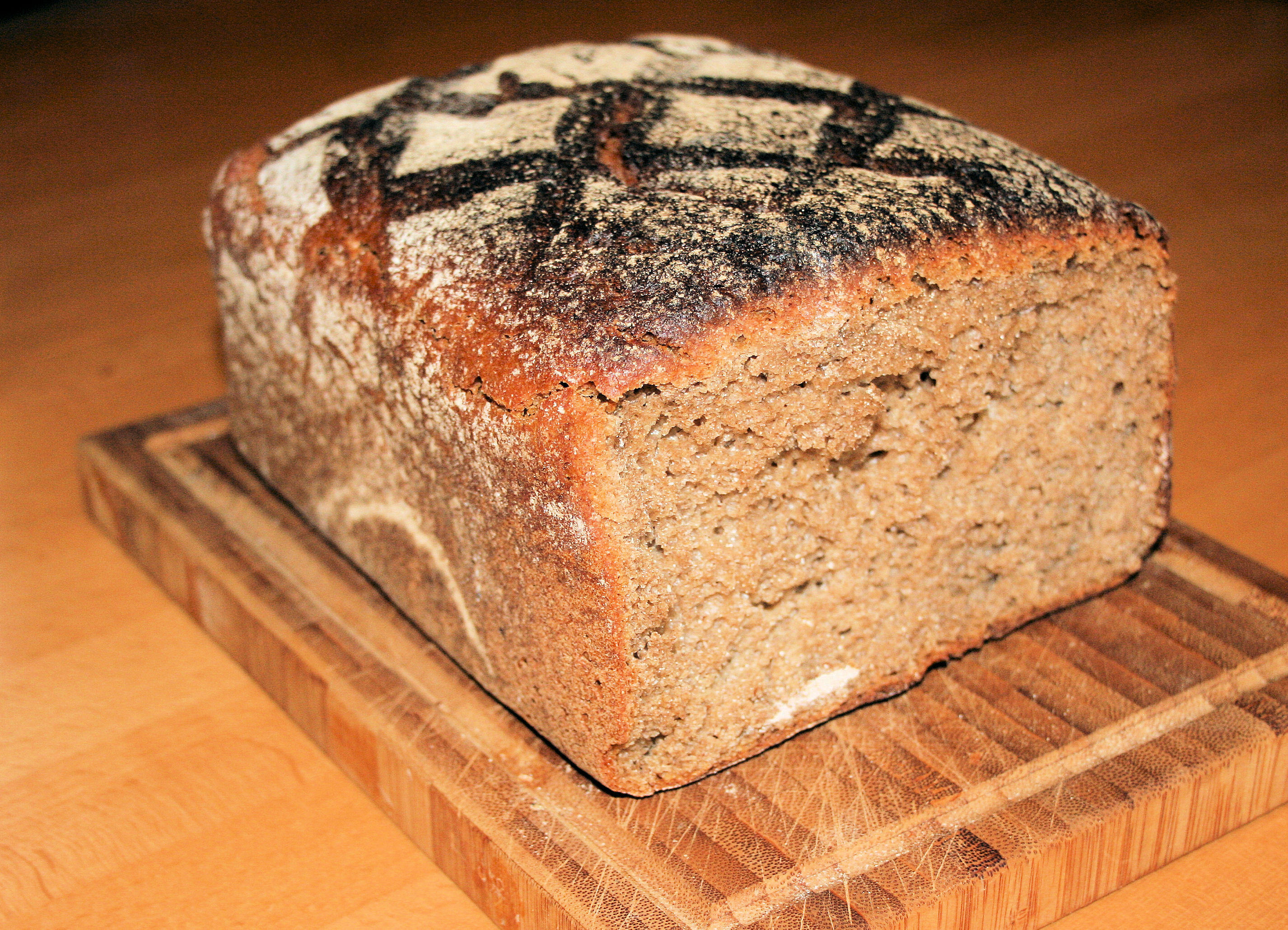 Kosakenbrot